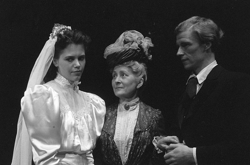 Original image description from the Deutsche Fotothek Szenenbilder